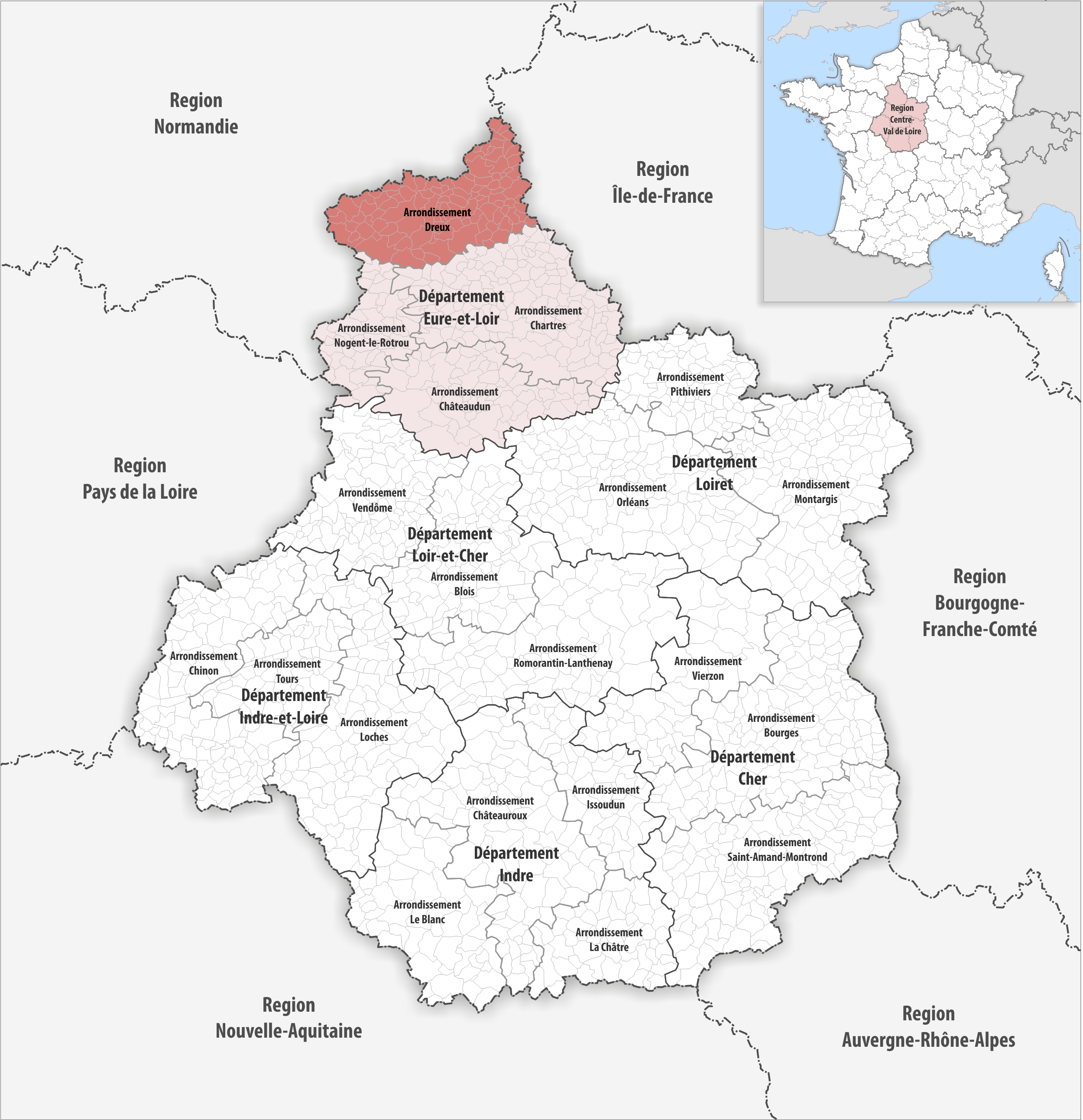 Lage des Arrondissements Dreux